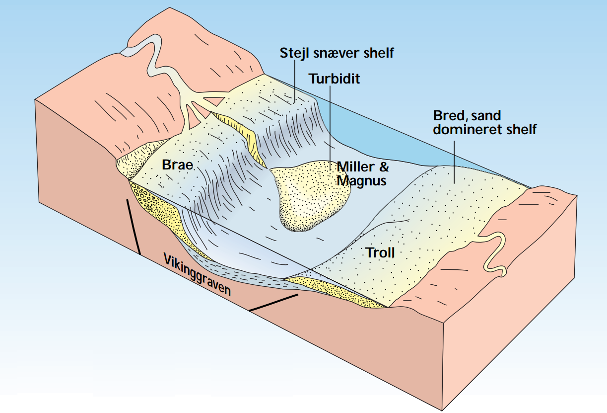 Blokdiagram af Viking Graben i Øvre Jura, med Brae og Troll-felterne (plays)